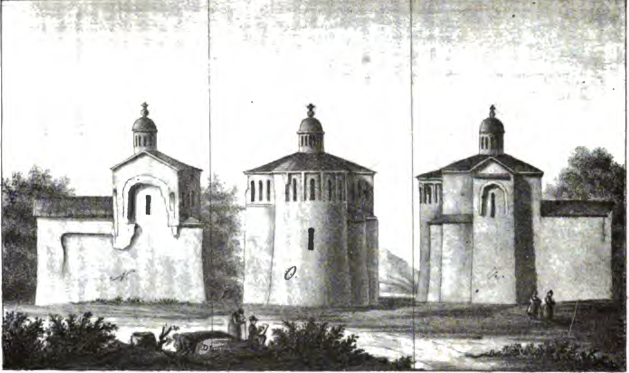 Церковь Иоанна Предтечи в Керчи, вид с юга, востока и севера. Мурзакевич Н. Поездка в Крым в 1836 // Журнал министерства народного просвещения.. — Санкт-Петербург: в типографии Императорской Академии Наук, 1837. — Т. Часть 13. — С. 672